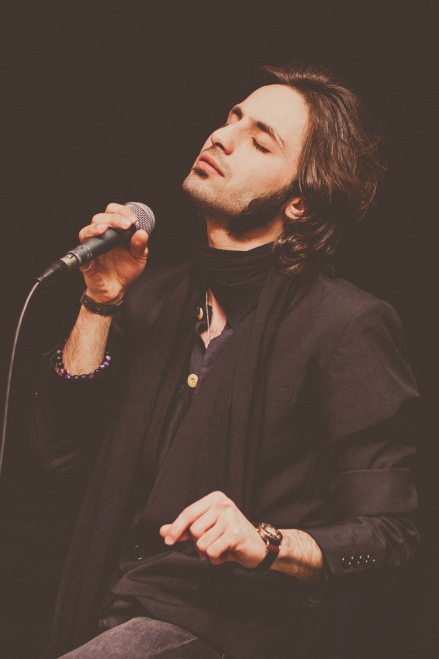 Erkin Osmanlı Baku Jazz Center-də.